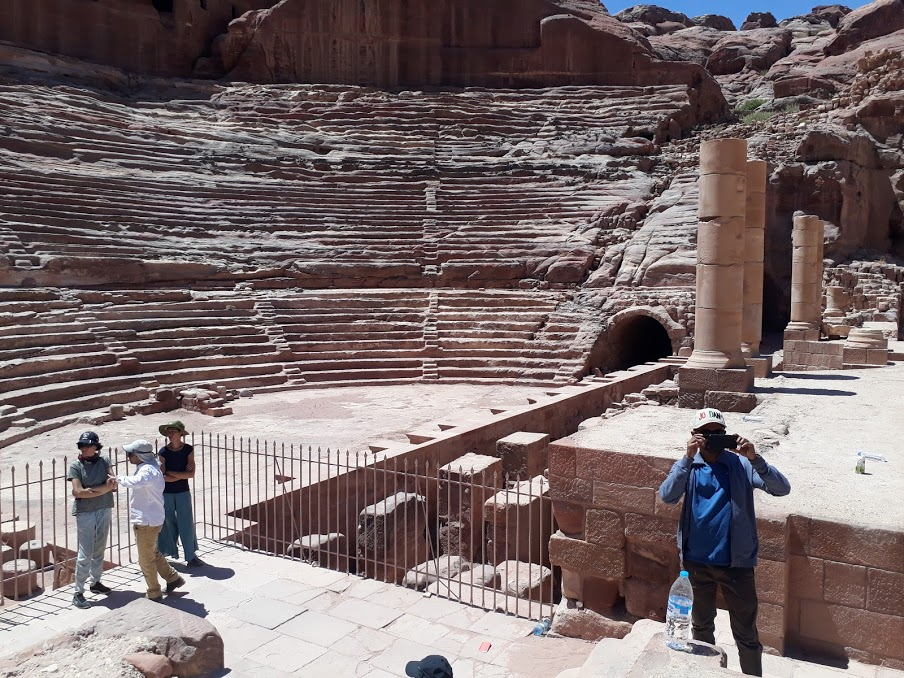 പെട്രയിലെ കല്ലിൽ കൊത്തിയ എണ്ണായിരം ഇരിപ്പിടങ്ങൾ ഉള്ള ഗ്യാലറി.!